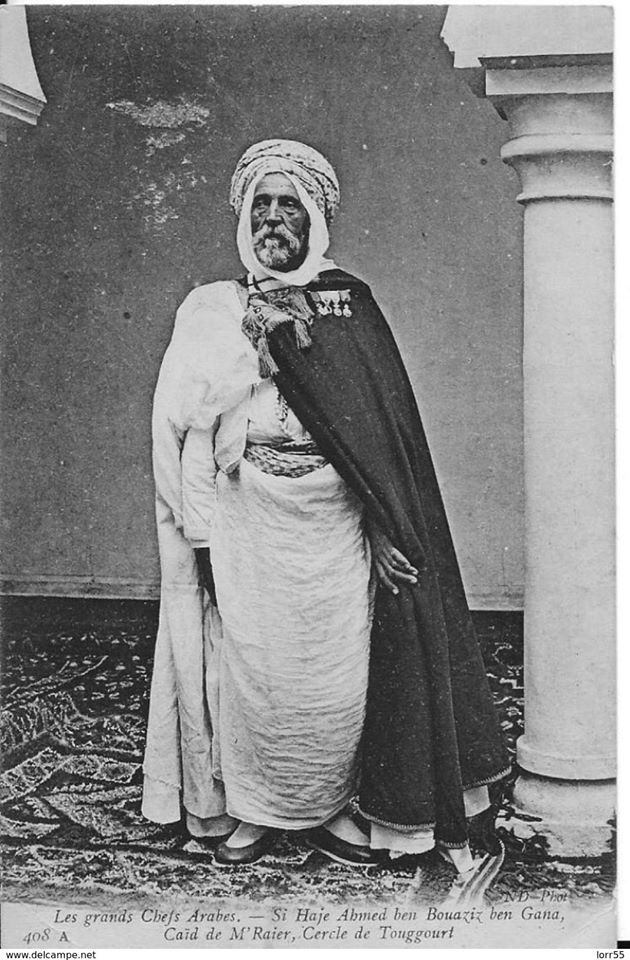 الحاج أحمد بن بوعزيز بن قانة حاكم المغير خلال فترة المقاومات الشعبية ضد الاستعمار الفرنسي